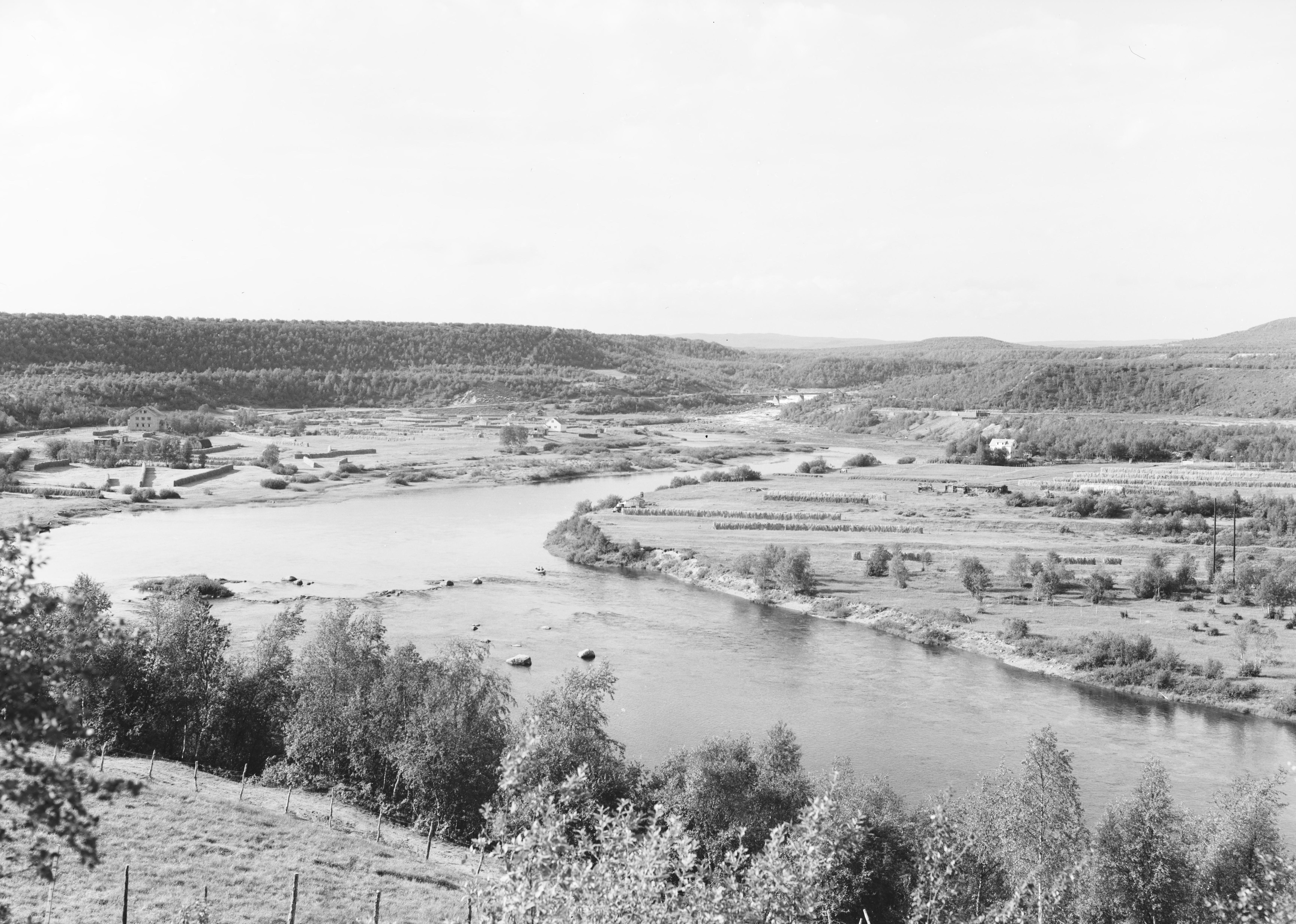 Bildet er hentet fra Nasjonalbibliotekets bildesamling. Anmerkninger til bildet var: Fotograf ukjent. Neiden,Neidenelva, Sør-Varanger, Finnmark